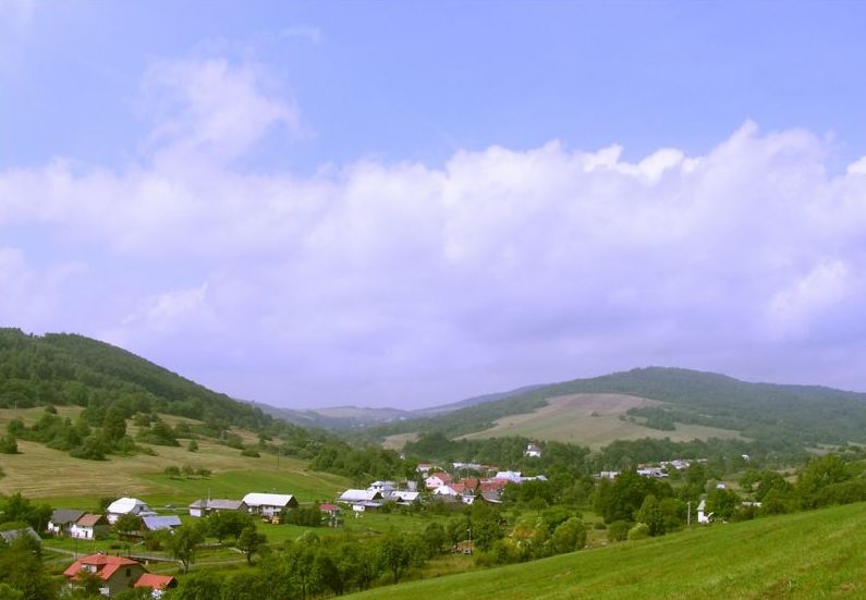 Celkový pohľad